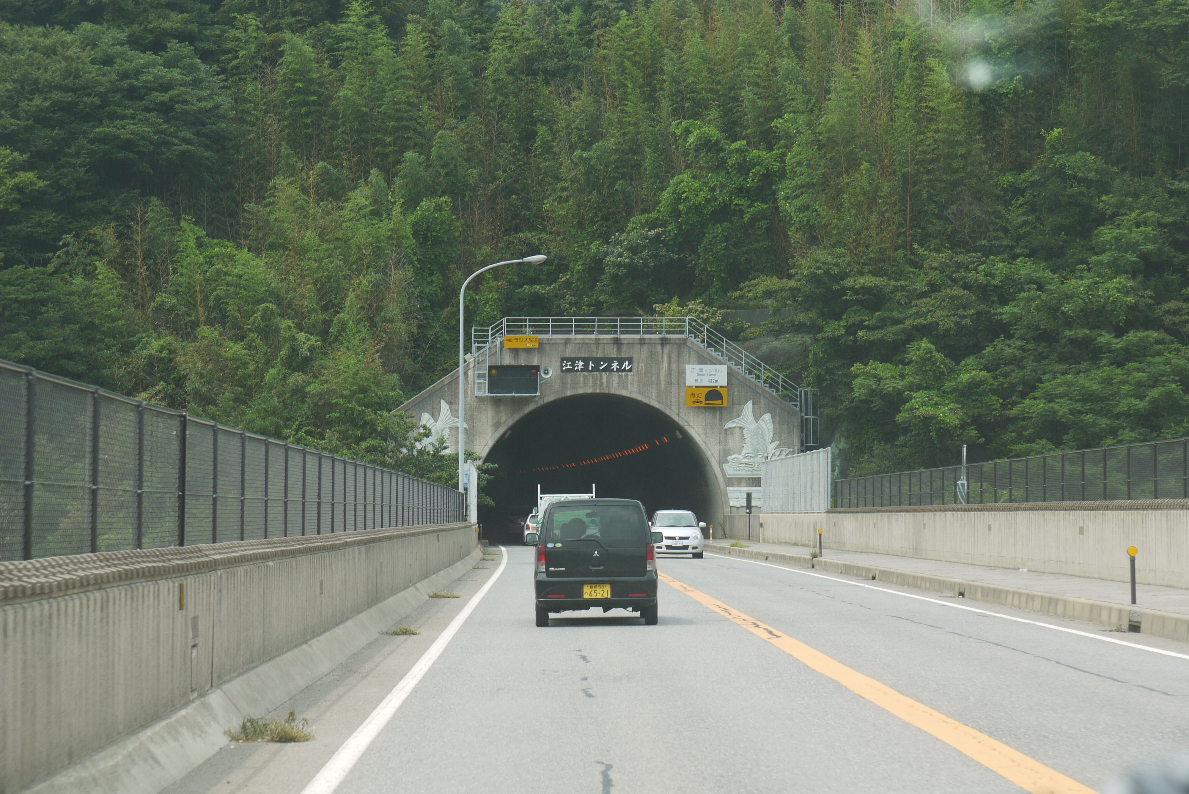 江津道路（2009年8月22日）